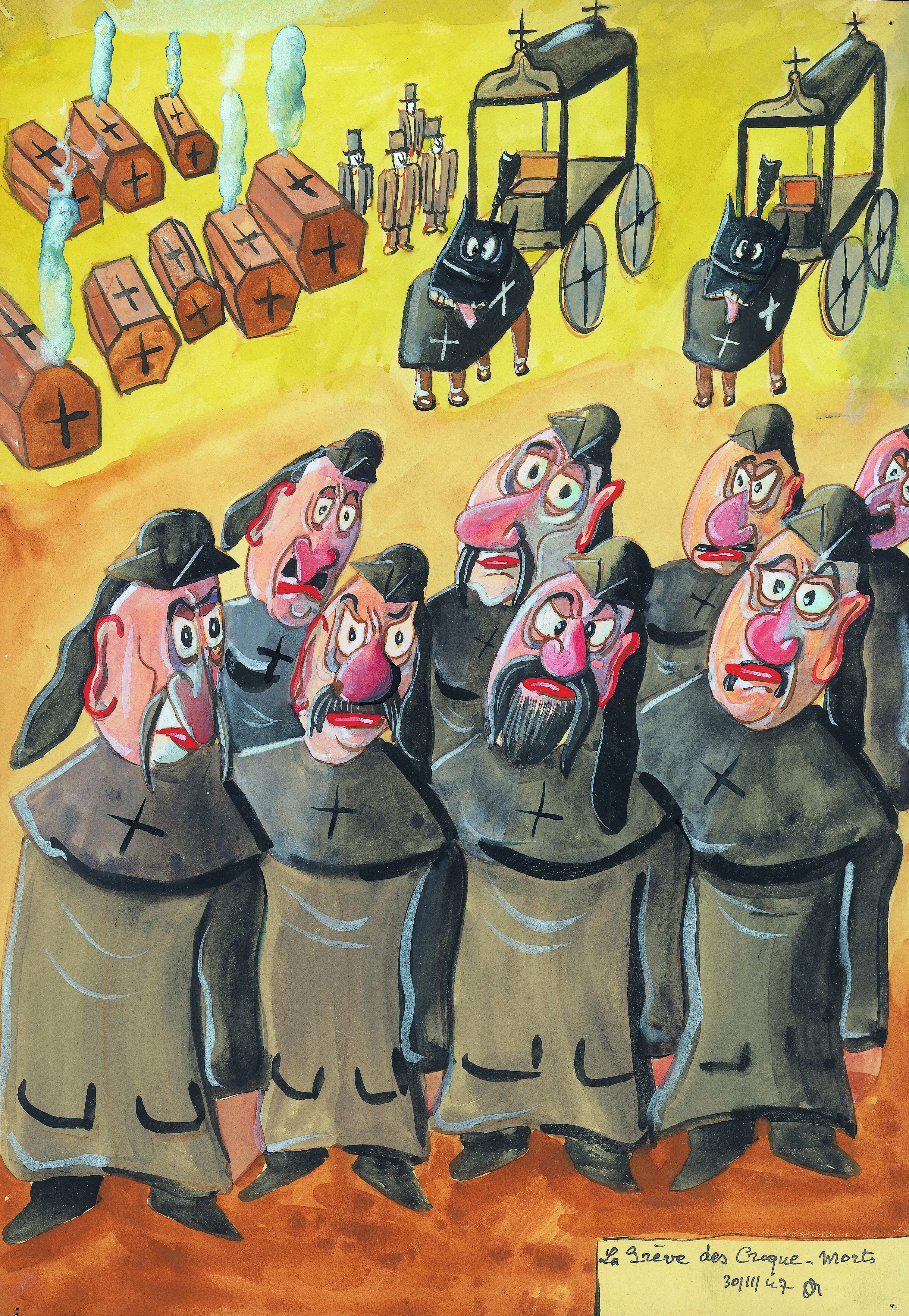 Satirische tekening gemaakt door André De Meulemeester uit Brugge